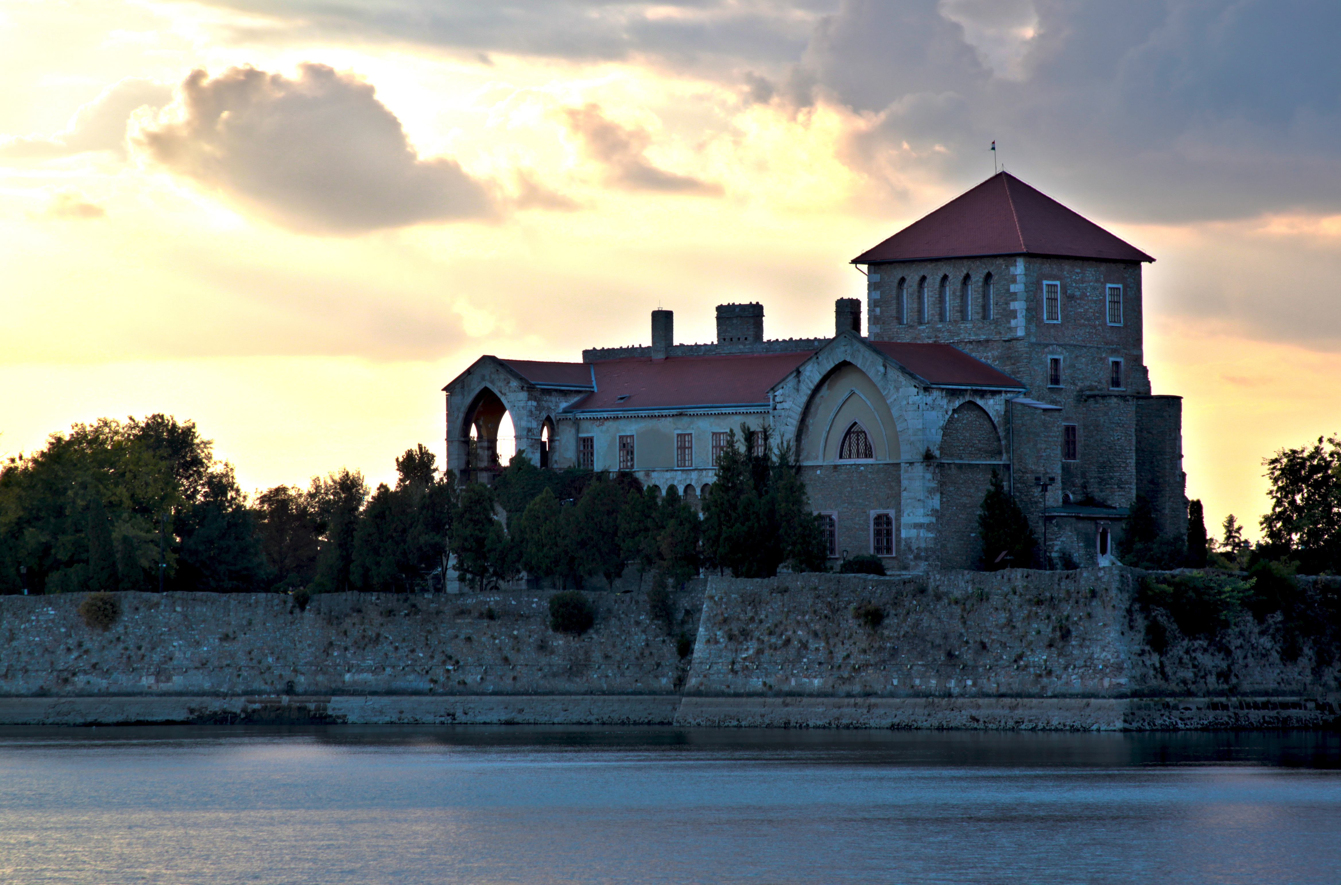 Vár (Tata, Váralja utca) This is a photo of a monument in Hungary, Identifier: 6470